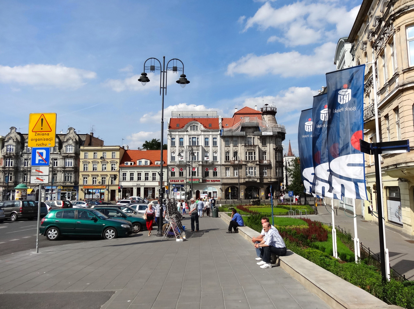 Plac Teatralny w Bydgoszczy